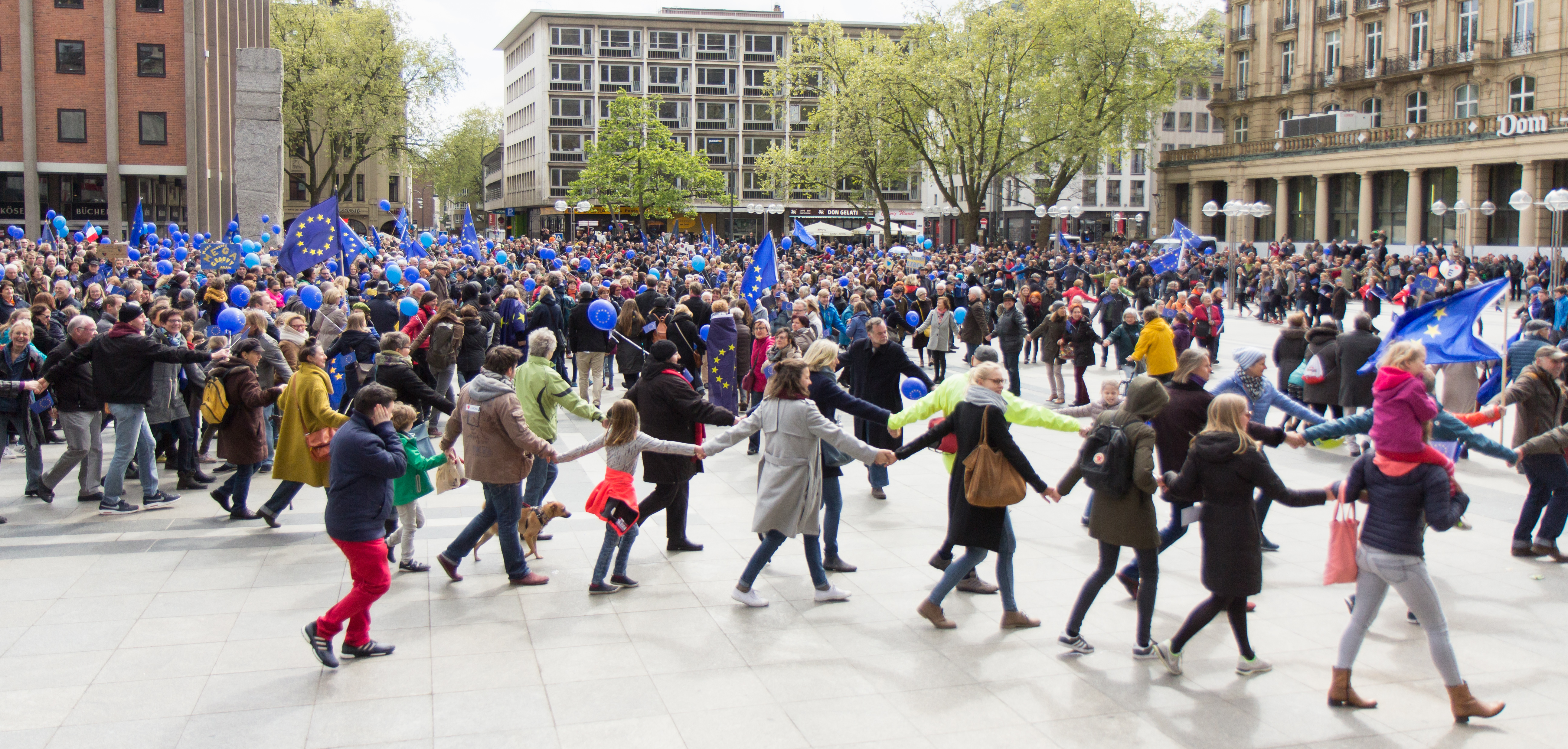 Pulse of Europe Demo in Köln, Roncalliplatz. Schwerpunktthema: Frankreich-Wahl